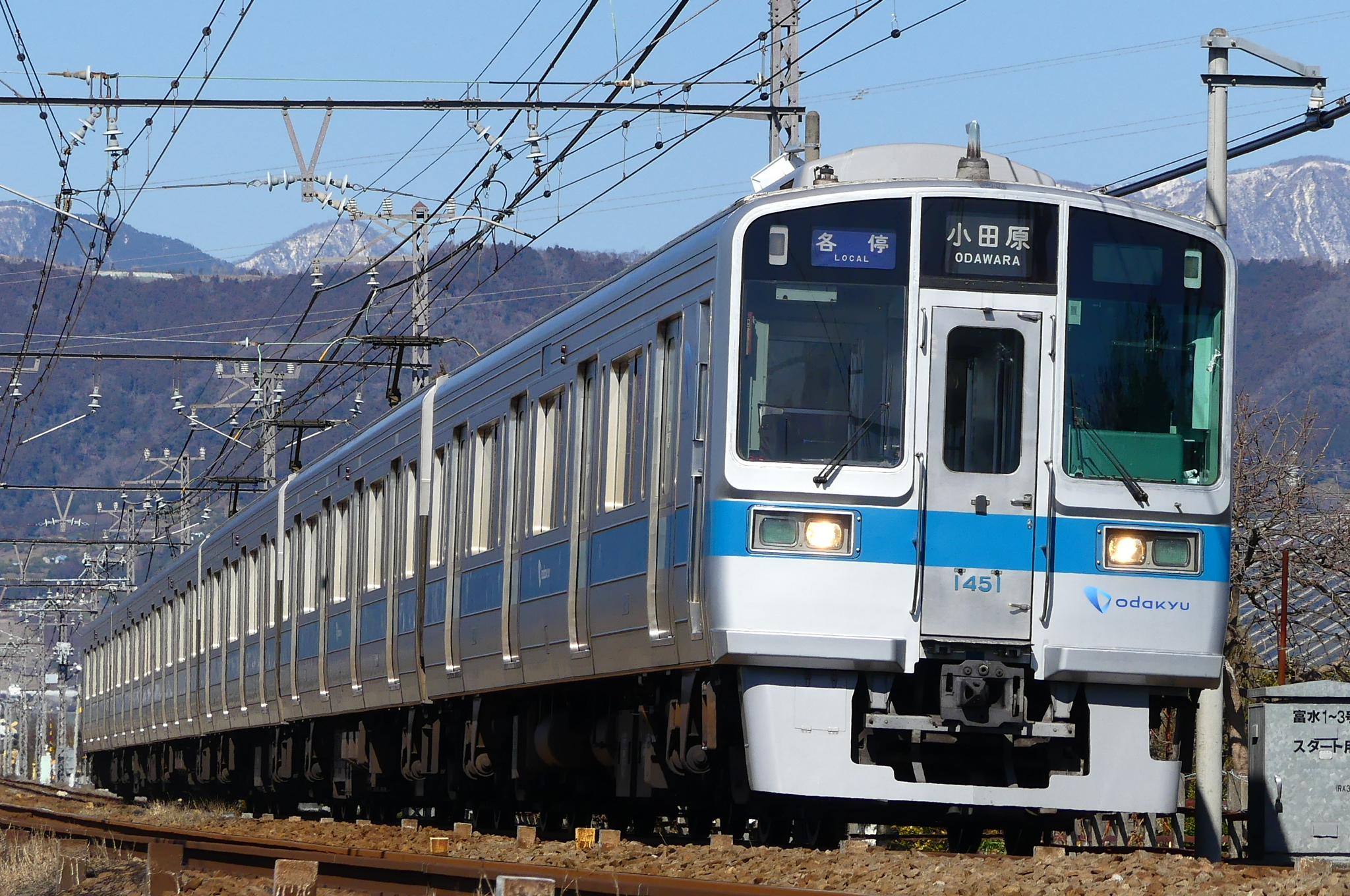 小田急電鉄1000形